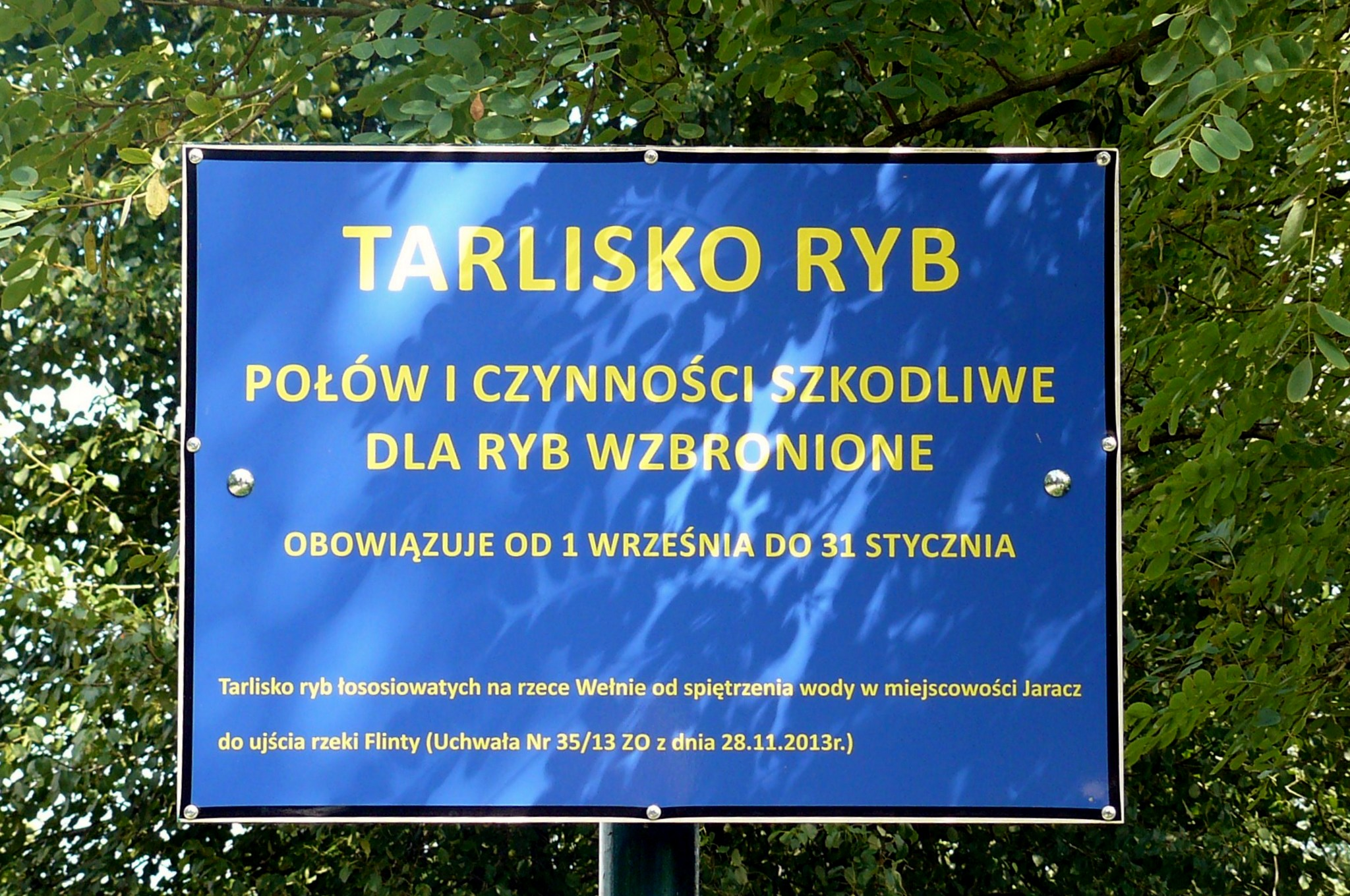 Wełna w Rożnowie Młynie.